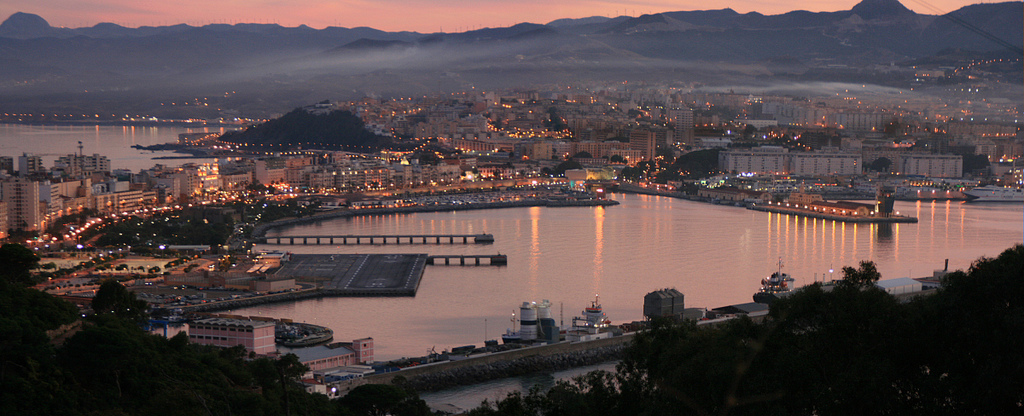 Ceuta desde el Monte Hacho, 2008